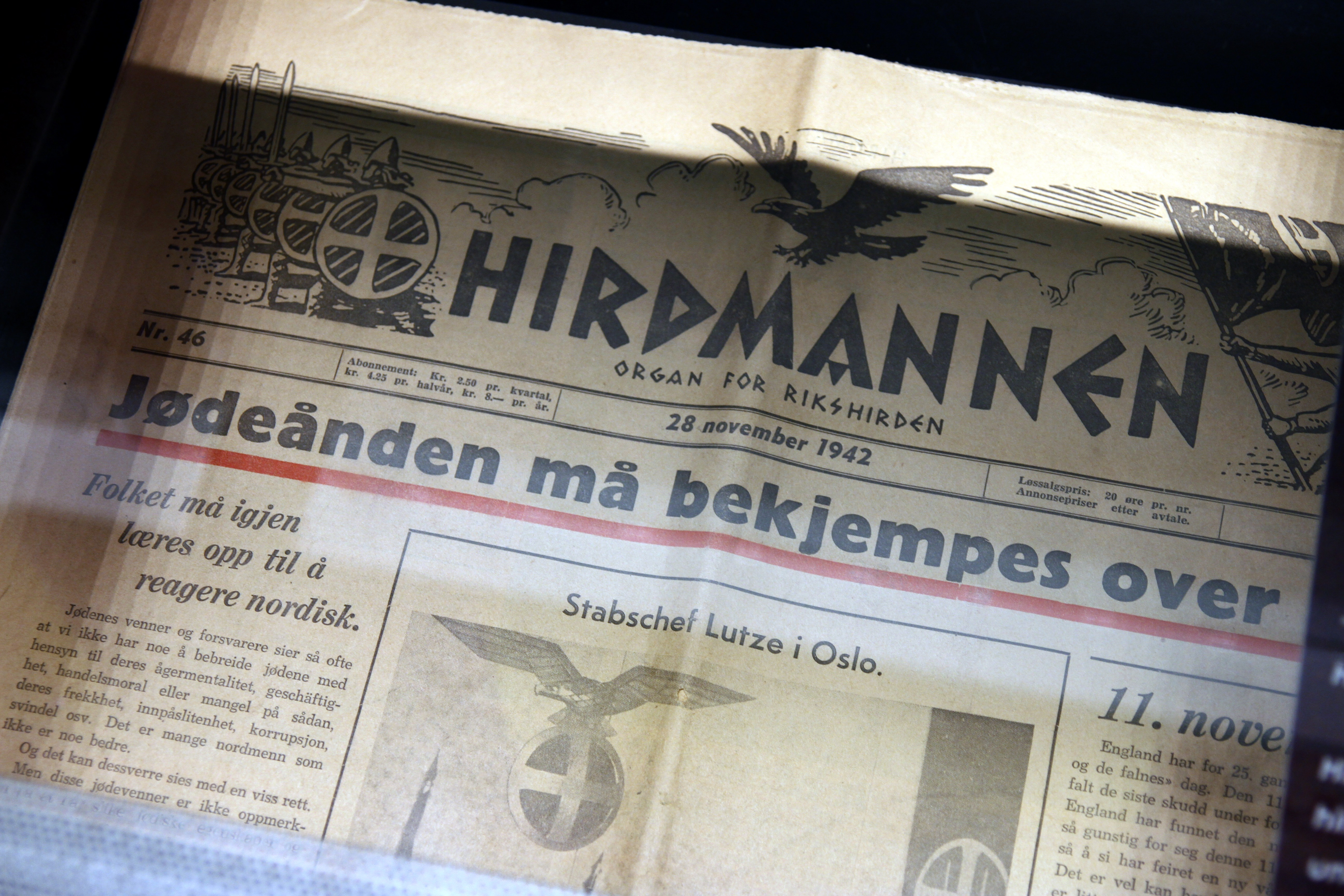 Hirdmannen (en norsk NS-avis), 28. november 1942. Hovedoppslag: "Jødeånden må bekjempes over alt!" På utstilling hos Senter for studier av Holocaust og livssynsminoriteter.